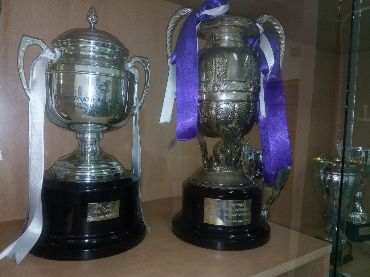 Foto del Campeonato de Liga de Segunda B 2012/13 y de la Copa Federación 2008/09